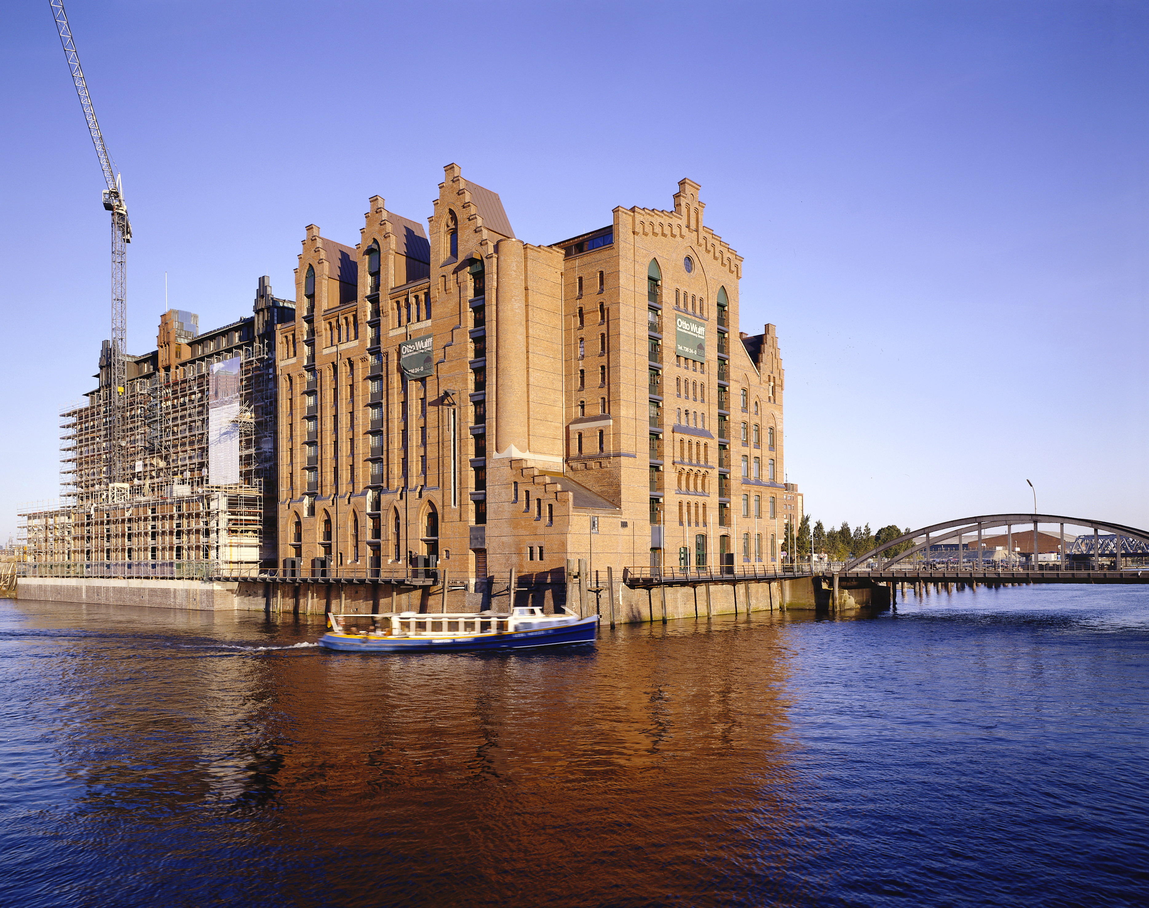 Speicherstadt im Hamburger HafenThis is a photograph of an architectural monument.